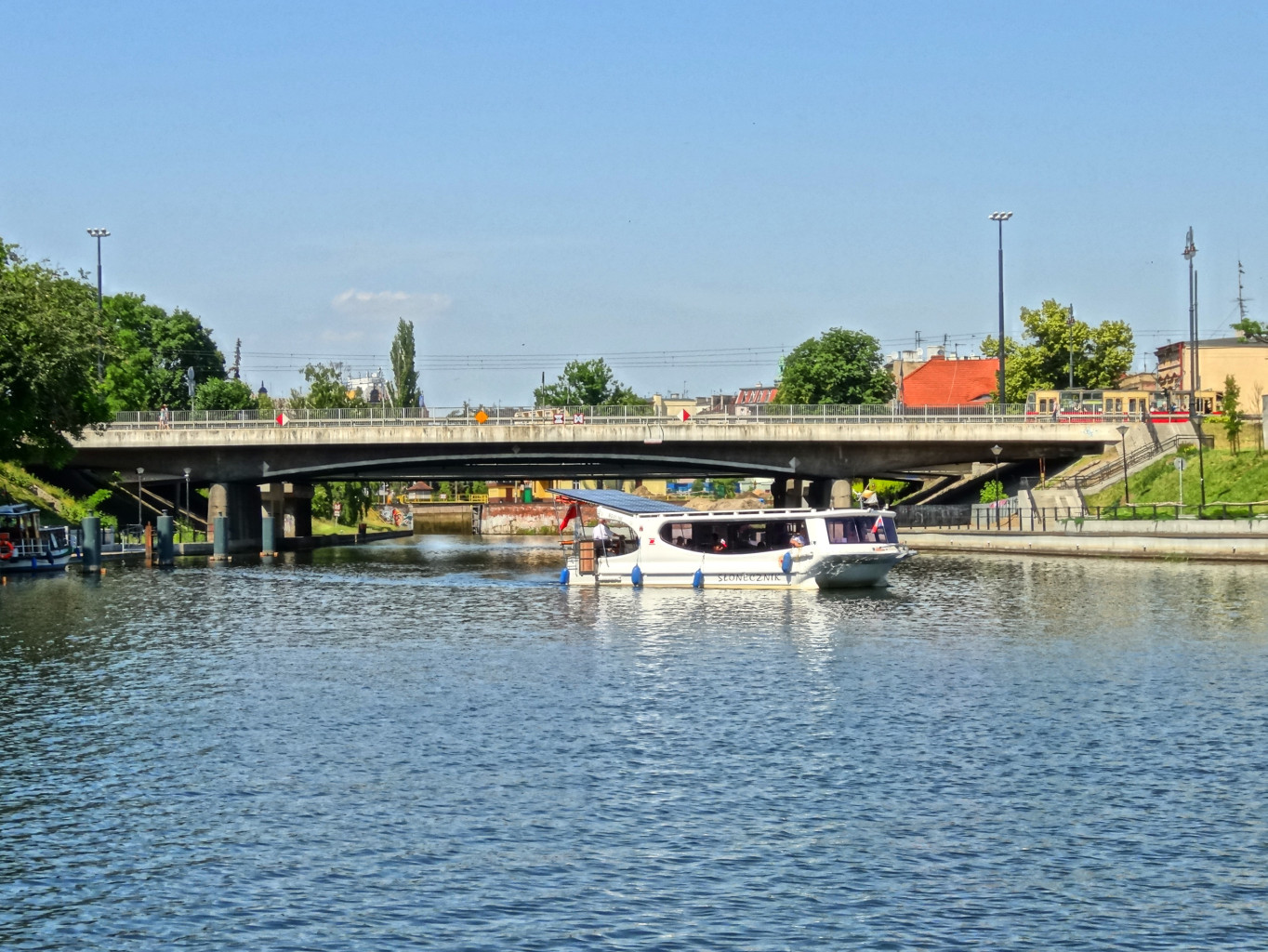 Mosty Solidarności w Bydgoszczy